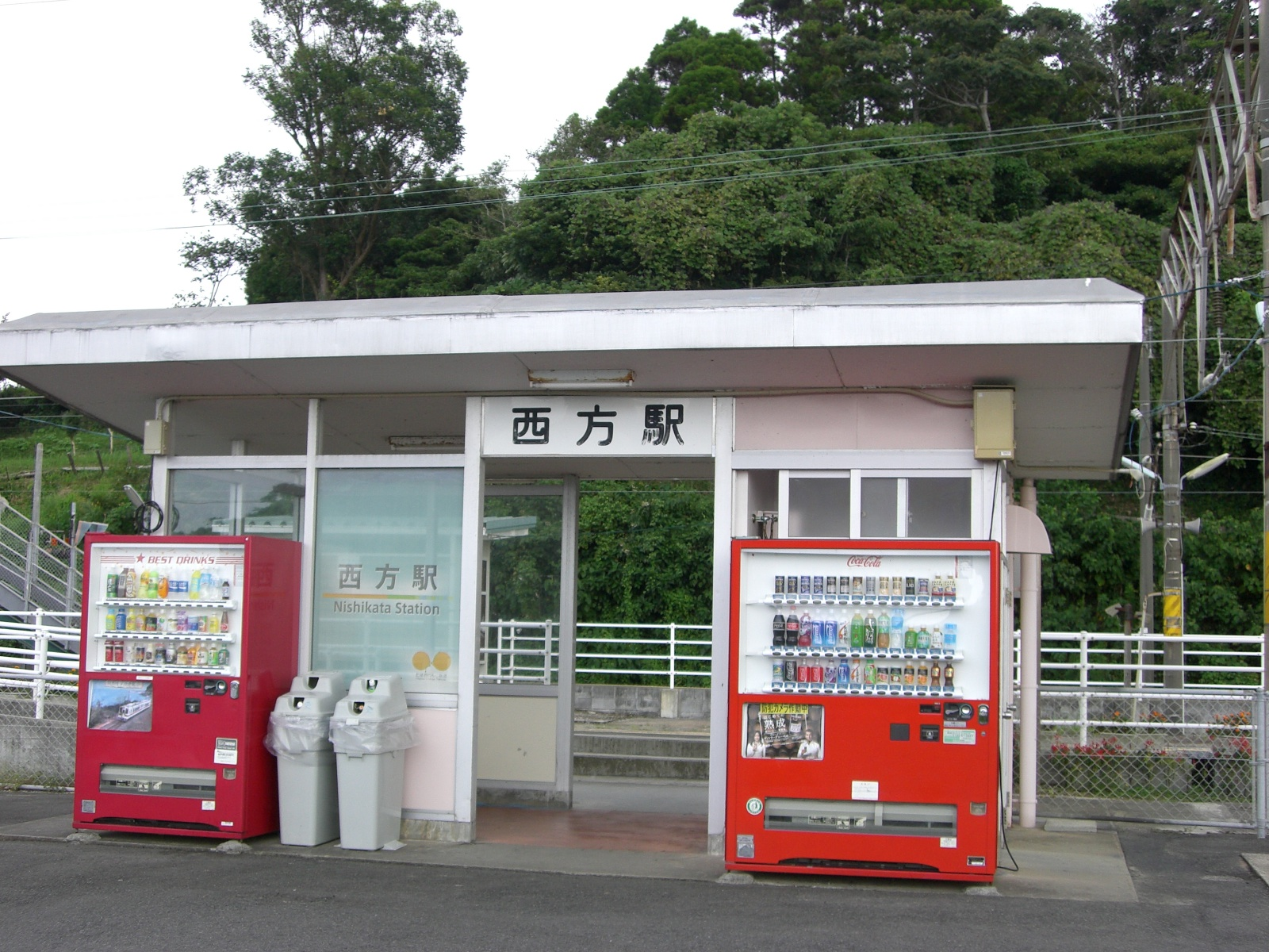 西方駅